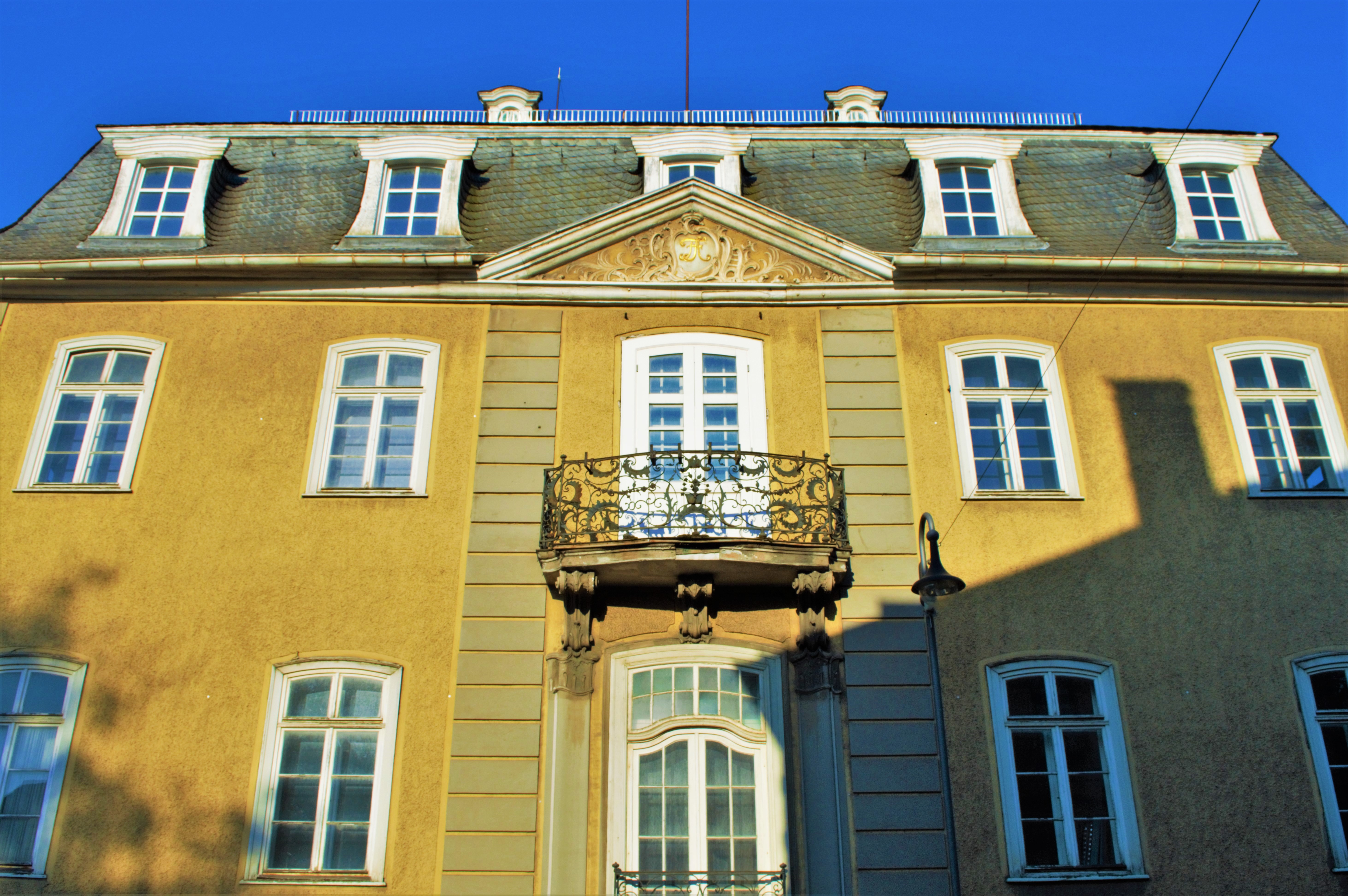 Prinzenpalais in Usingen - Frontansicht